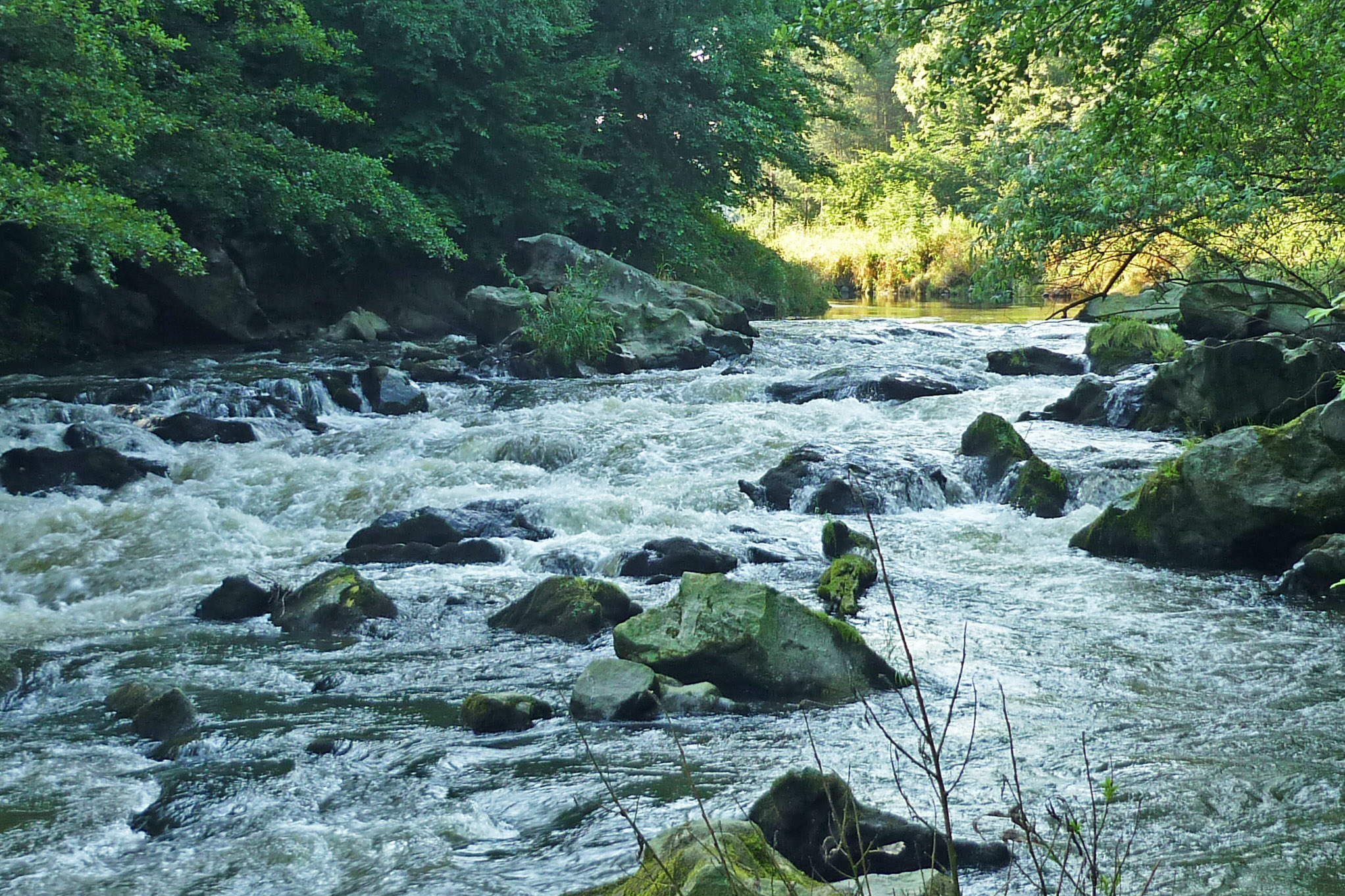 Osiecznica - Diabli Jaz (Teufelswehr bei Wehrau, Woiwodschaft Niederschlesien